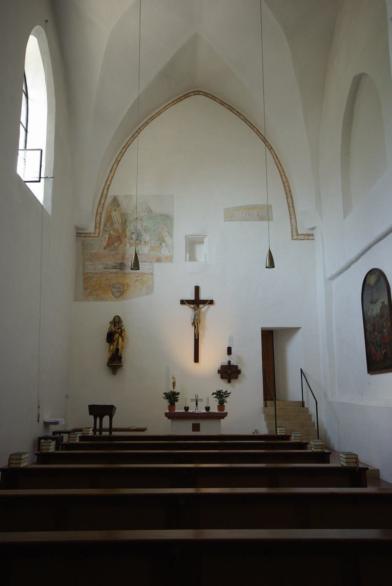 Salzburger Str. 32, 83435 Bad Reichenhall, Münster St. Zeno Genehmigung für Innenaufnahmen durch Erzbischöfliches Ordinariat München, Ressort Bauwesen und Kunst vom 21.08.2012 liegt schriftlich vor.This is a photograph of an architectural monument.